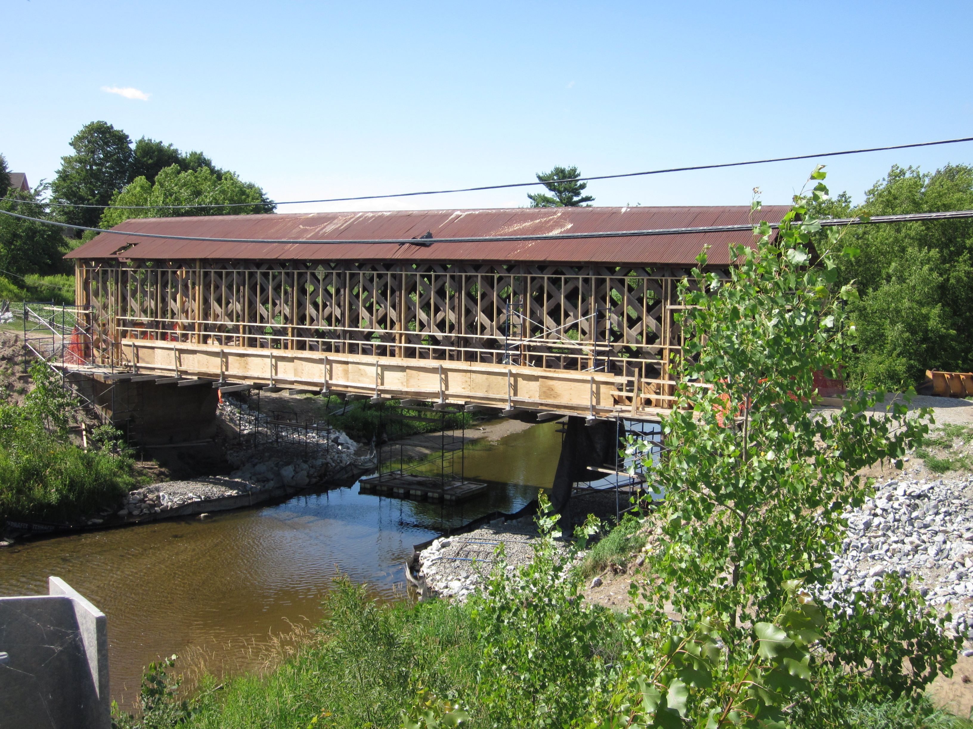 Pont Joseph-Édouard-Perrault en rénovation